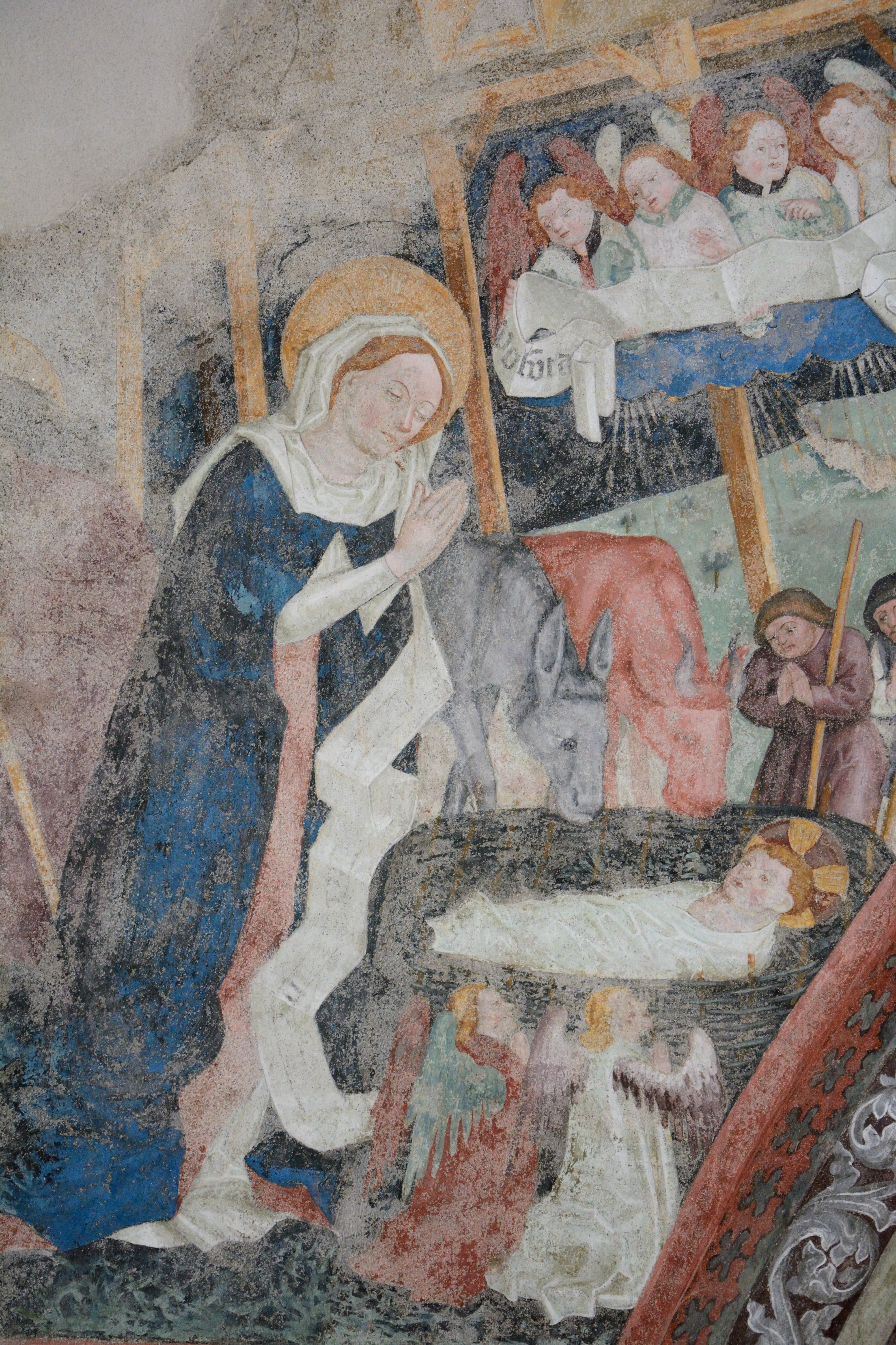 Fresko im Kreuzgang des Brixner Domes, Gewölbe der 14. Arkade: Geburt Christi. Werkstatt des Meisters Leonhard von Brixen, um 1463.